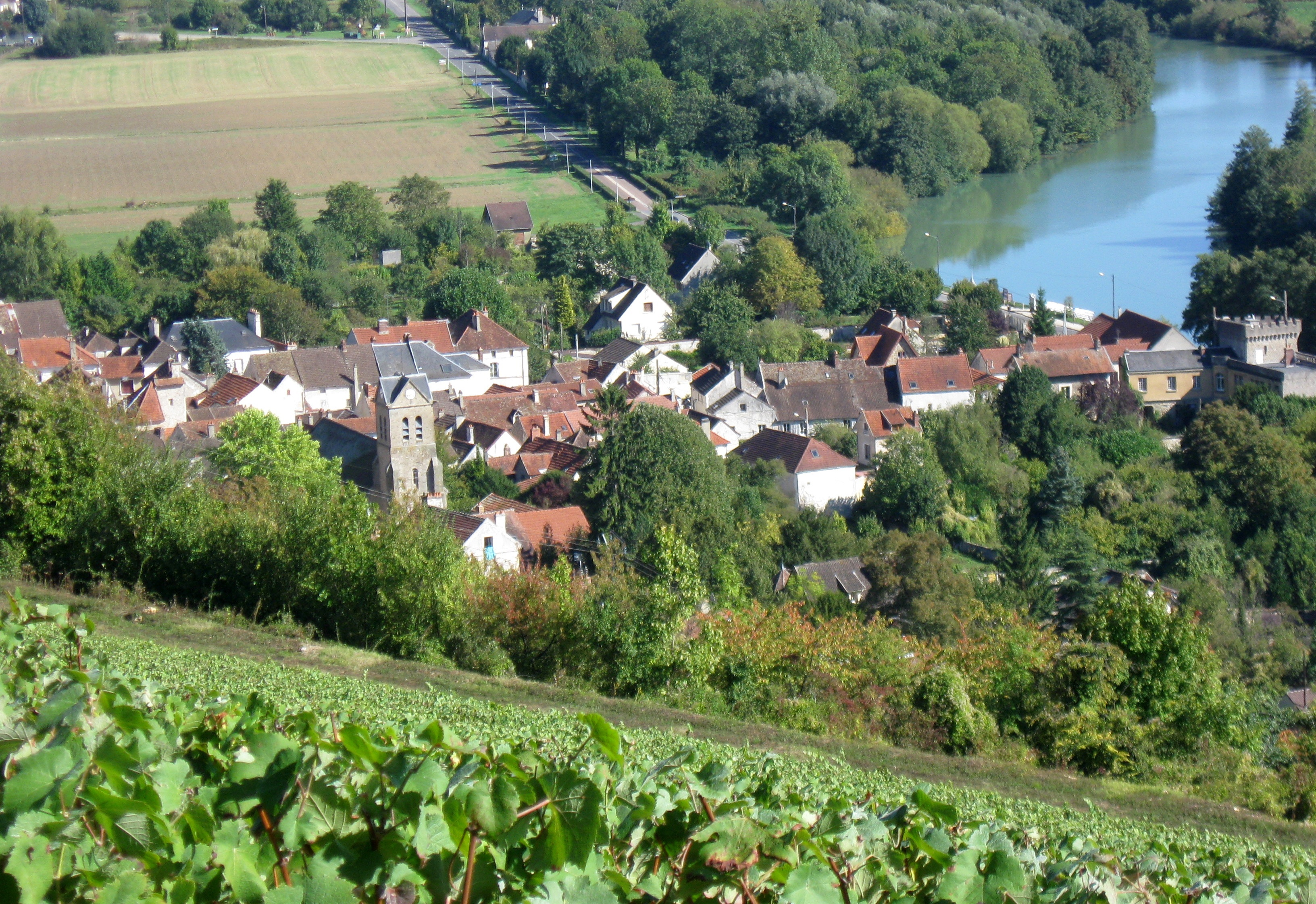 Le village de Nanteuil-sur-Marne. (département de la Seine et Marne, région Île-de-France).